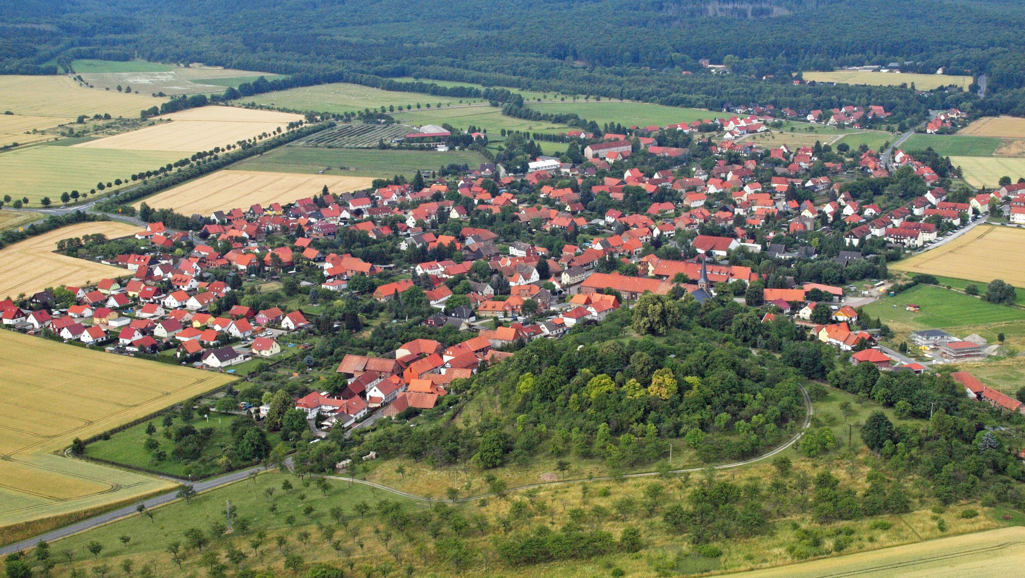 Stapelburg, Luftaufnahme (2015)